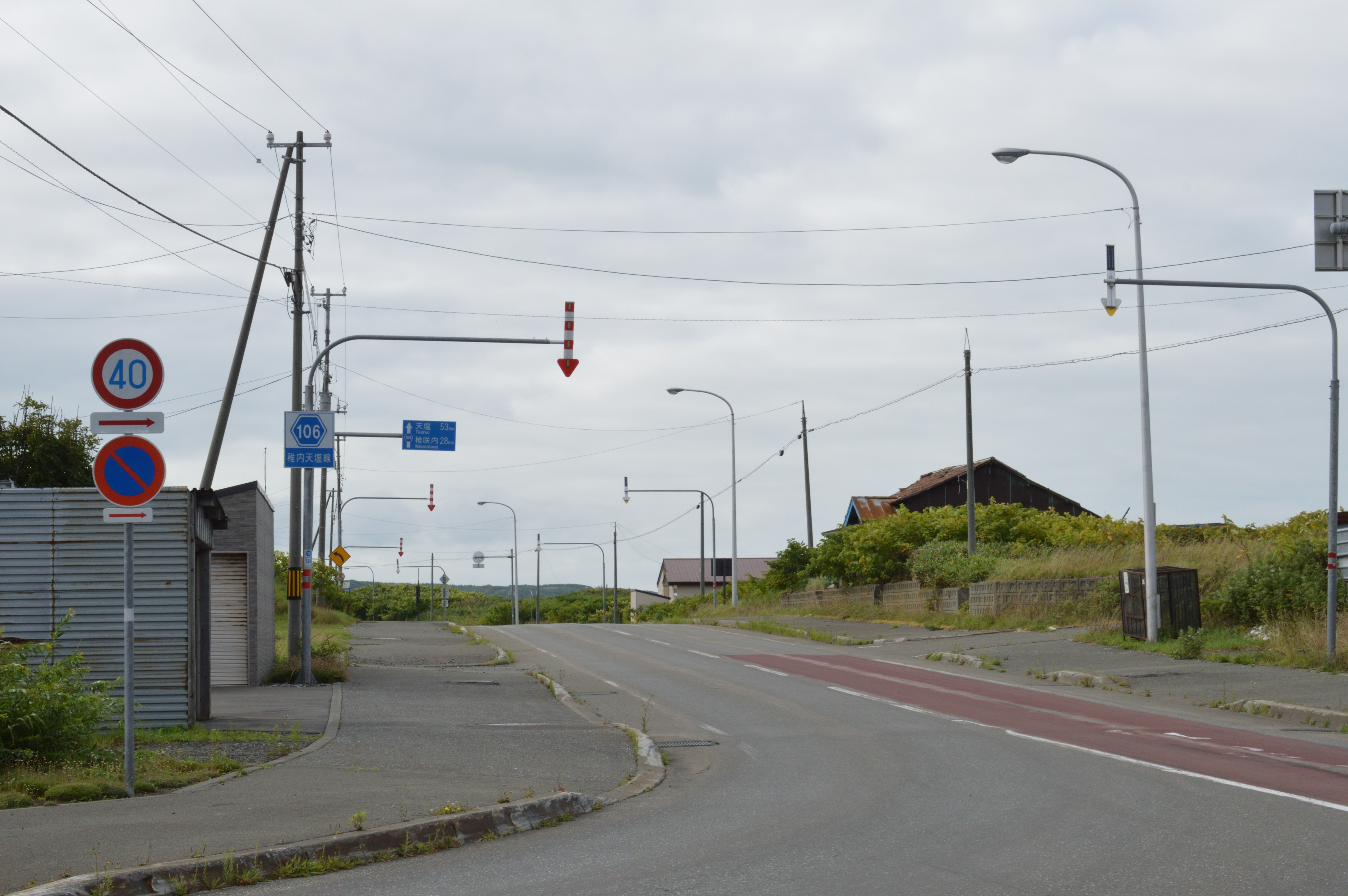 北海道道106号稚内天塩線（道道254号との合流点 稚内市抜海村字バッカイ） Nikon D3200